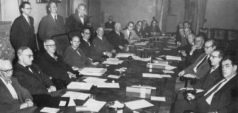 Stadskollegiet hösten 1953. Ordförande Yngve Larsson flankerad av Hjalmar Mehr på sin högra sida. Bilden tagen i Stora Kollegiesalen i Stockholms stadshus. (Jmf diskussion här). Bildtext (skriven av Yngve Larsson): Stadskollegiet hösten 1953 - jämför dess motsvarighet beredningsutskottet enligt föregående bild! En betydligt talrikare, betydligt ledigare församling; bland alla de slätrakade karlarna finns även två kvinnor, Vera Söderström (s) och Gurli Kollberg (fp), båda placerade längst ner vid bordet. Själv sitter jag som ordforande, på min högra sida väl bevakad av Hjalmar Mehr, oppositionens ledare, i sin tur flankerad av John Bergvall, finansborgarråd. På min vänstra sida Erik Johansson, min företrädare i ordförandestolen, och Carl Albert Andersson, stadsfullmäktiges ståtlige ordförande. Mittemot mig sitter högern, i politisk lågkonjunktur förminskad till en grupp på tre man, Alf Grandien, vice ordförande i kollegiet, just tändande en cigarrett, vilket varit otänkbart i gamla beredningsutskottet, Carl Patric Ossbahr, "den siste oscarianen" enligt Joakim Garpe, och Gösta Agrenius, ansvarig för stadens energiförsörjning ända in i kärnkraftsåldern. Folkpartiet dominerade 1953 stort både bland borgarråden och kollegieledamöterna - jamför den ende liberalen 1915 (Allan Cederborg)!